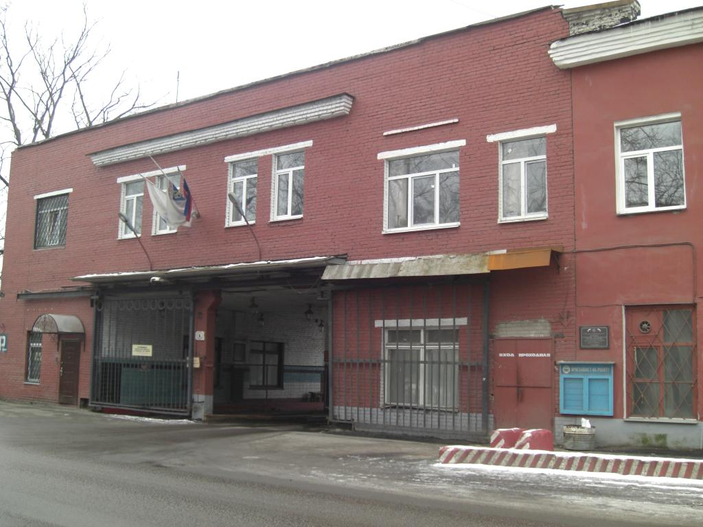 ОАО "Гатчинапассажиравтотранс" (улица Хохлова, Гатчина)